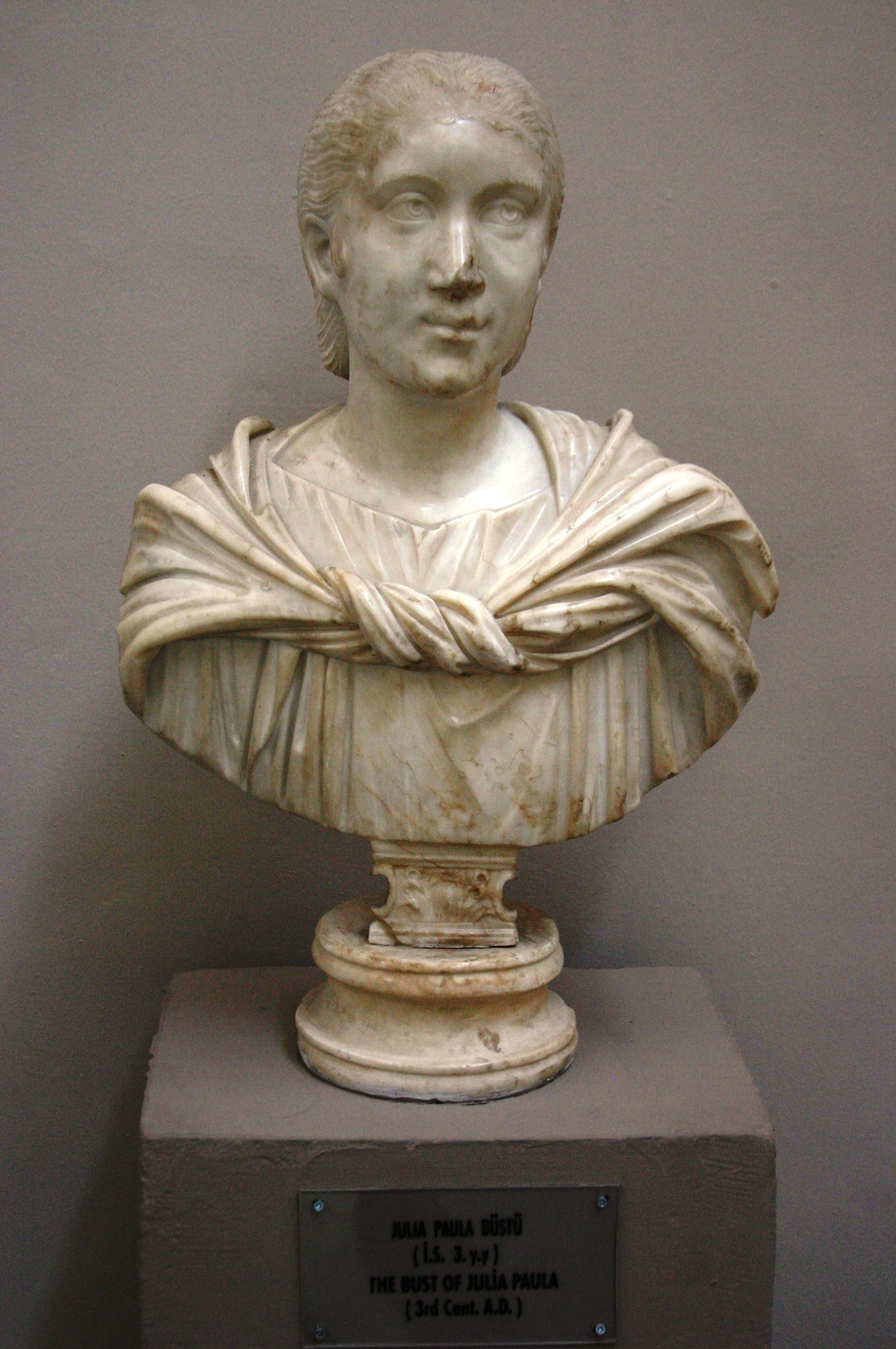 Júlia Paula